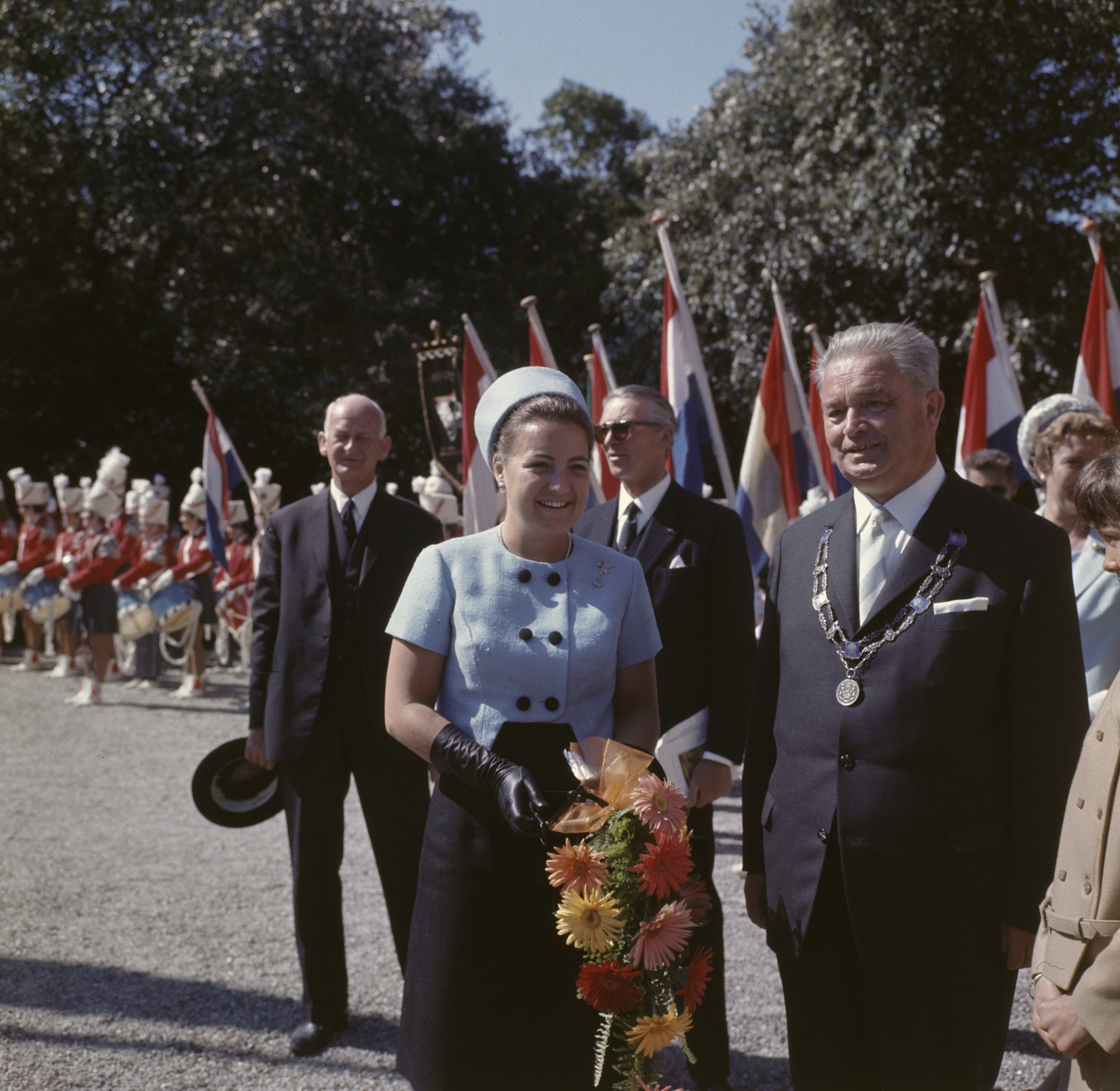 Collectie / Archief : Fotocollectie Anefo Reportage / Serie : [ onbekend ] Beschrijving : Prinses margriet legt ergens een bezoek af; hier samen met de burgemeester Datum : ongedateerd Trefwoorden : burgemeesters, prinsessen Persoonsnaam : Margriet, prinses Fotograaf : Fotograaf Onbekend / Anefo Auteursrechthebbende : Nationaal Archief Materiaalsoort : Dia (kleur) Nummer archiefinventaris : bekijk toegang 2.24.01.07 Bestanddeelnummer : 254-7815